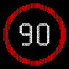 LEdSign2